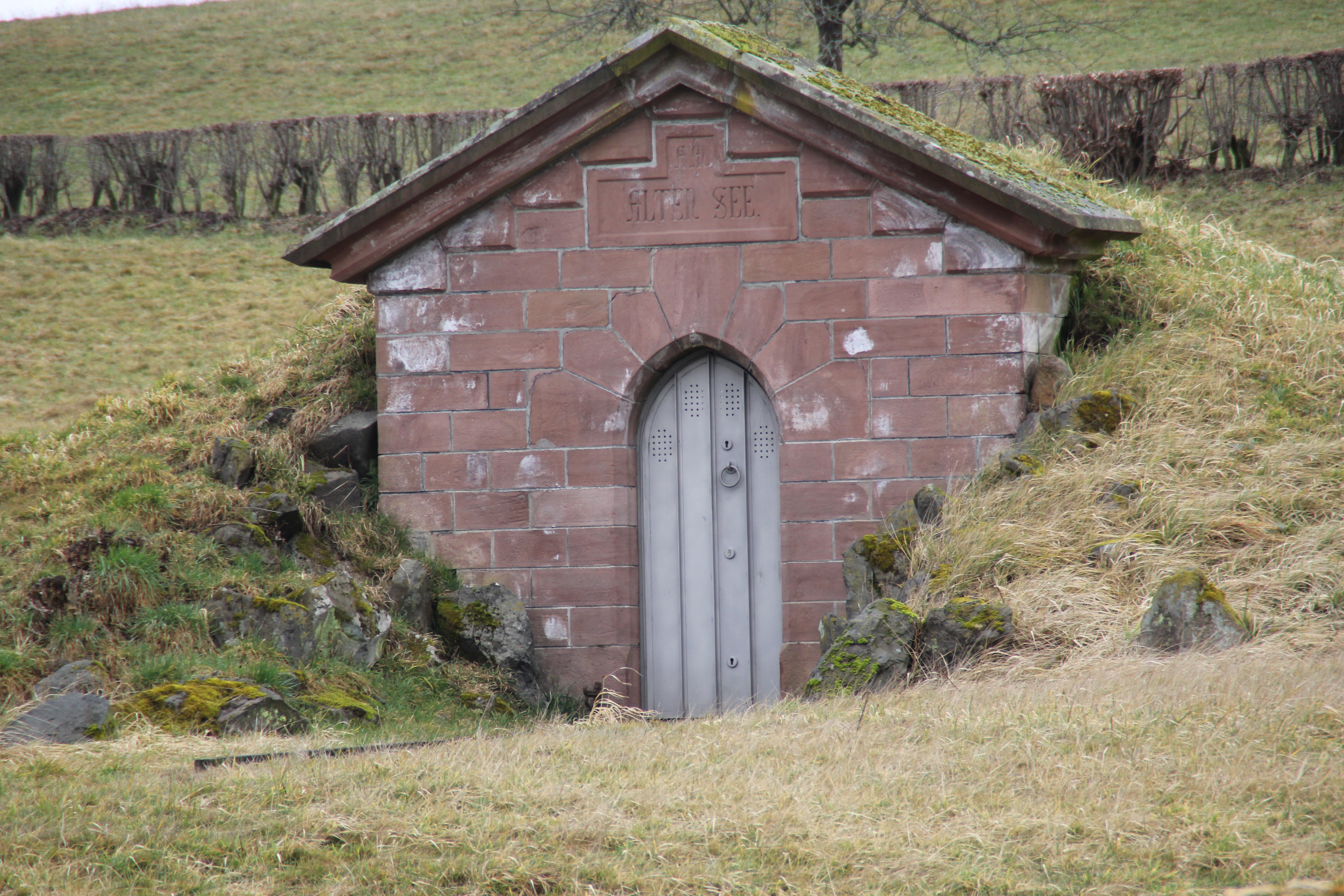 Die Trinkwasserquelle Alter See